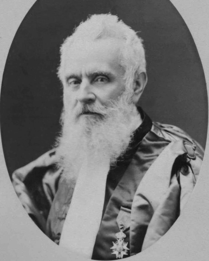 Photographie de Joseph Arthaud, médecin aliéniste de Lyon